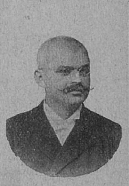 Jan Přikryl (1853-1910), rakouský rolník a politik z Moravy; poslanec Moravského zemského sněmu